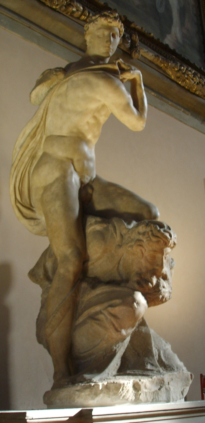 Palazzo vecchio, michelangelo, genio della vittoria 01.1